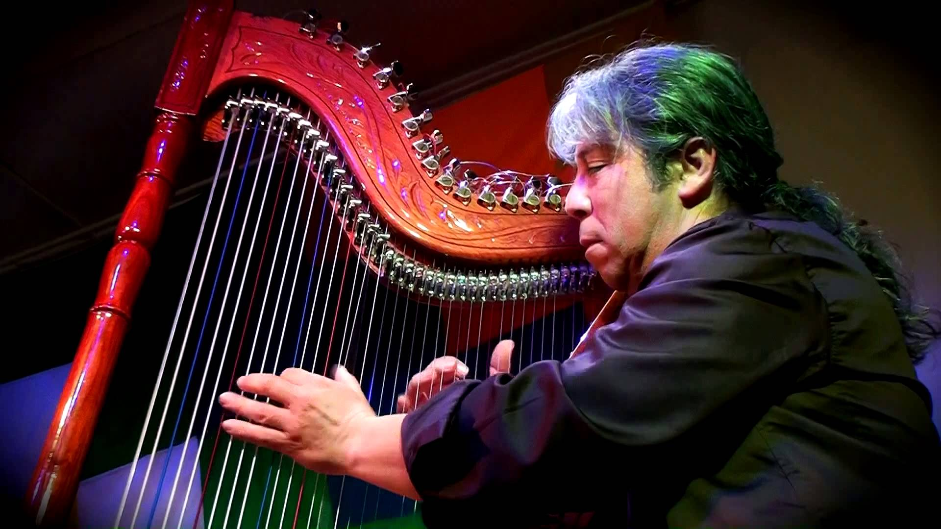 Ismael Ledesma. Arpista paraguayo